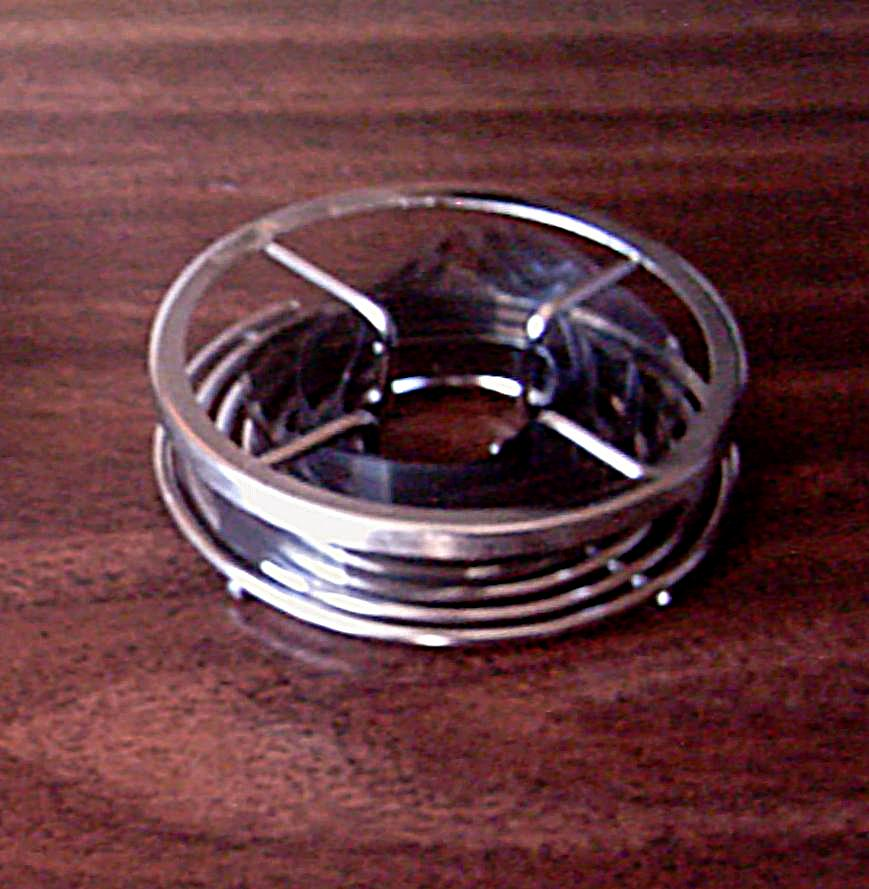 Nikor 16毫米螺旋卷盘 Nikor 16mm development reel 唐戈摄影 2006